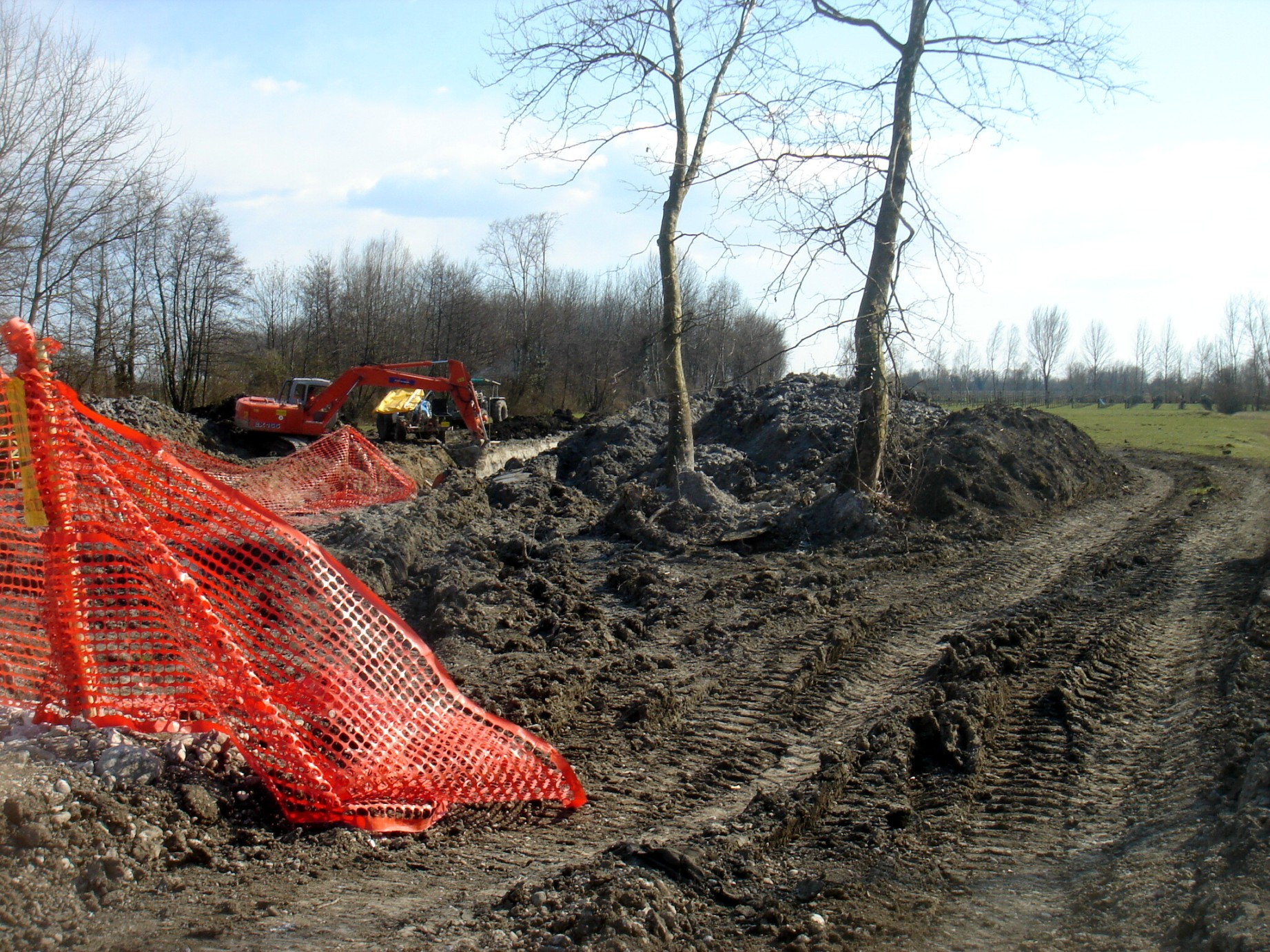 Devastazione del paesaggio naturale dei palù per la costruzione dell'autostrada A28 Sacile-Conegliano.